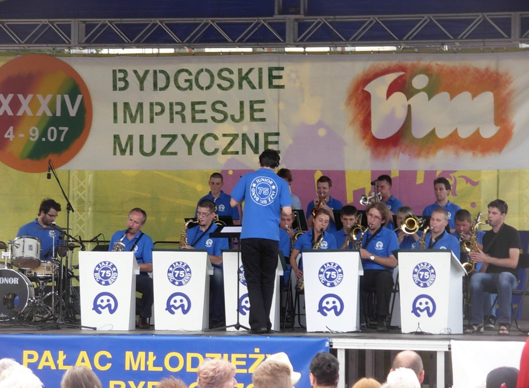 XXXIV Bydgoskie Impresje Muzyczne. Występuje zespół Jazz Bigband 75 - Polska